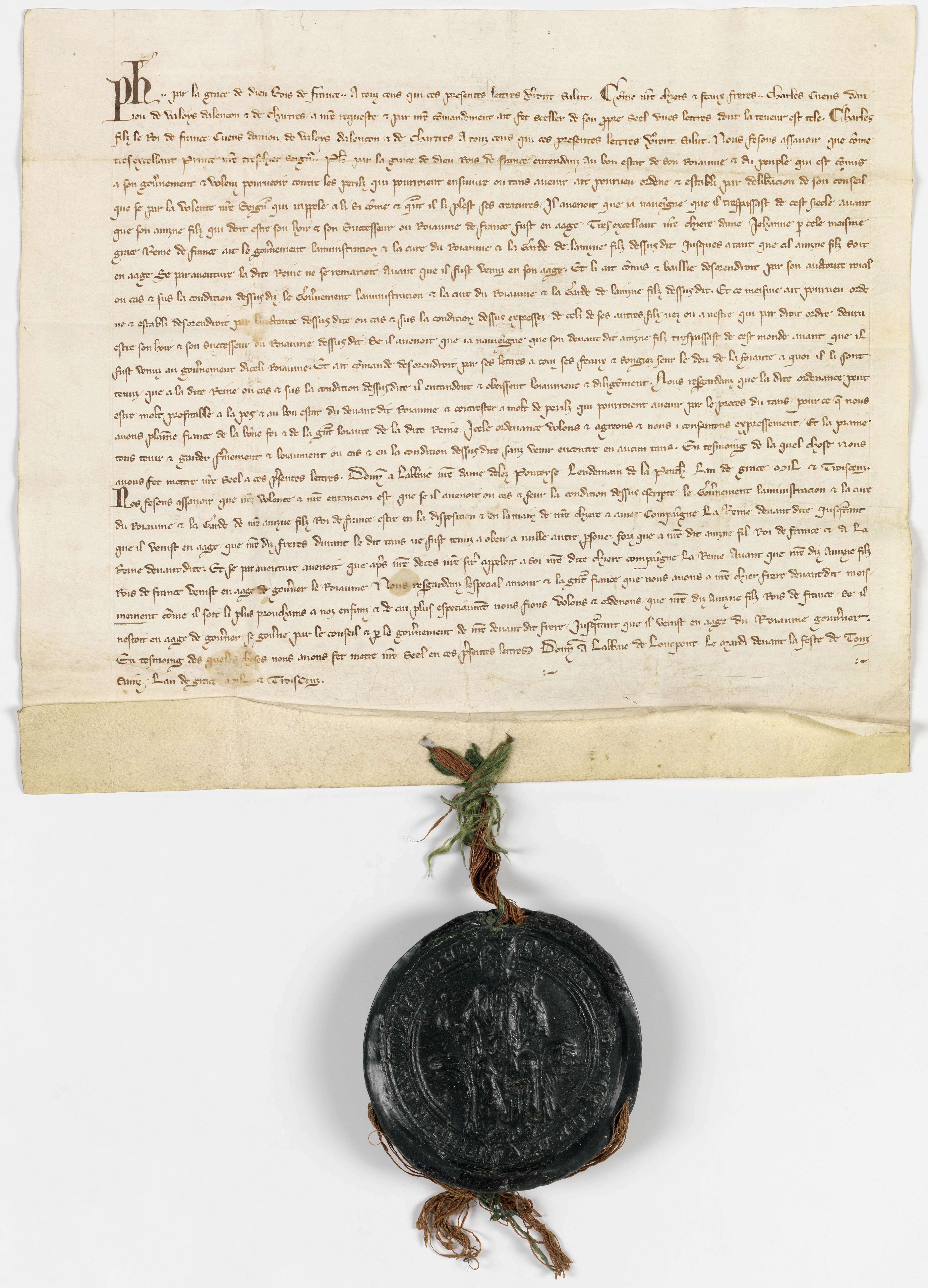 Charte de Philippe le Bel par laquelle il déclare qu’en cas de décès avant la majorité de son fils aîné la régence du royaume et la tutelle de ses enfants seront dévolues à la reine Jeanne ou, si elle-même décède, à son frère Charles de Valois, lequel a auparavant accepté cette décision dans un acte vidimé par cette même charte. Scellée de cire verte sur lacs de soie rouge et verte à l'abbaye de Longpont le 25 octobre 1300